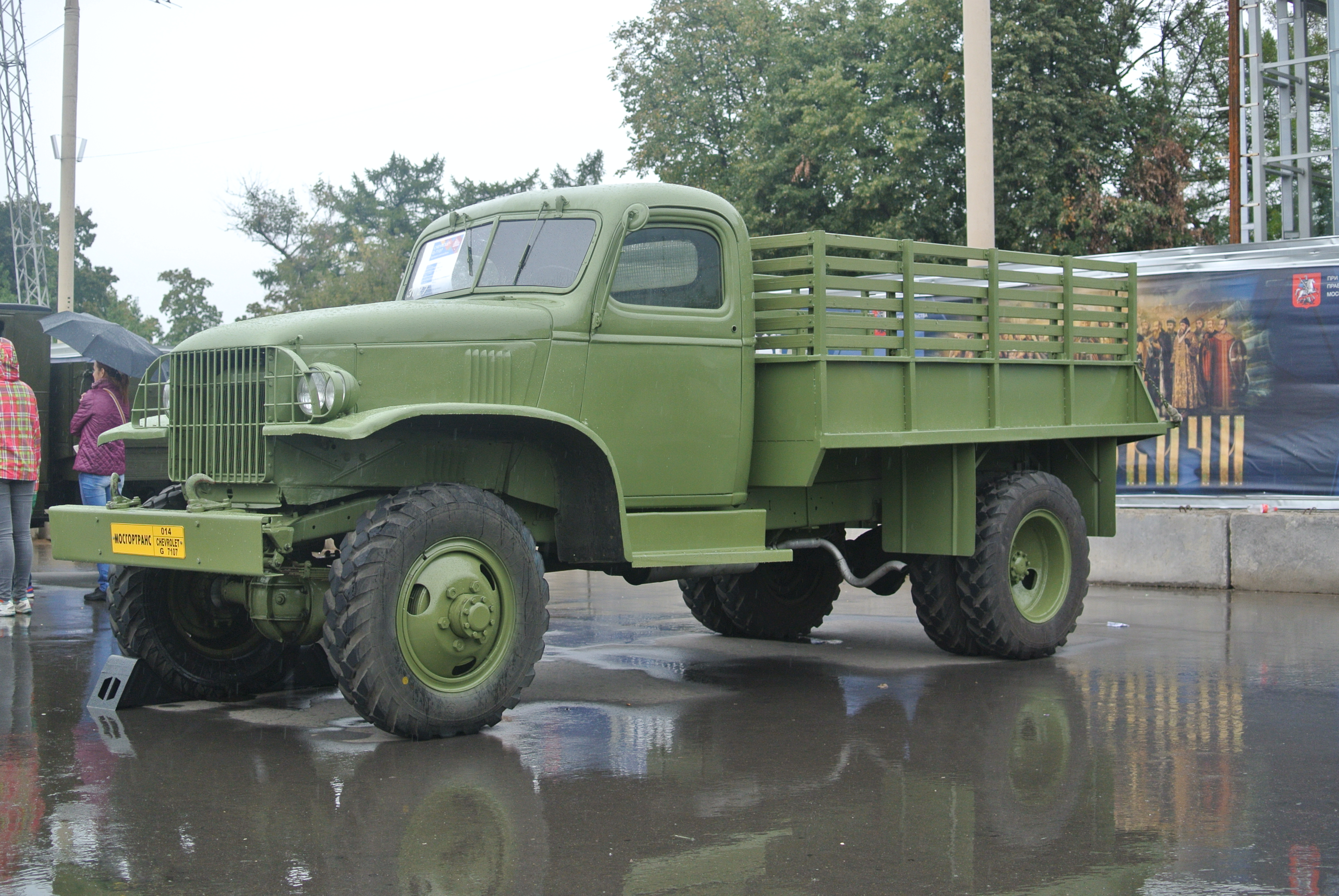 1,5-тонный грузовик Chevrolet G7107 на экспозиции на ВВЦ